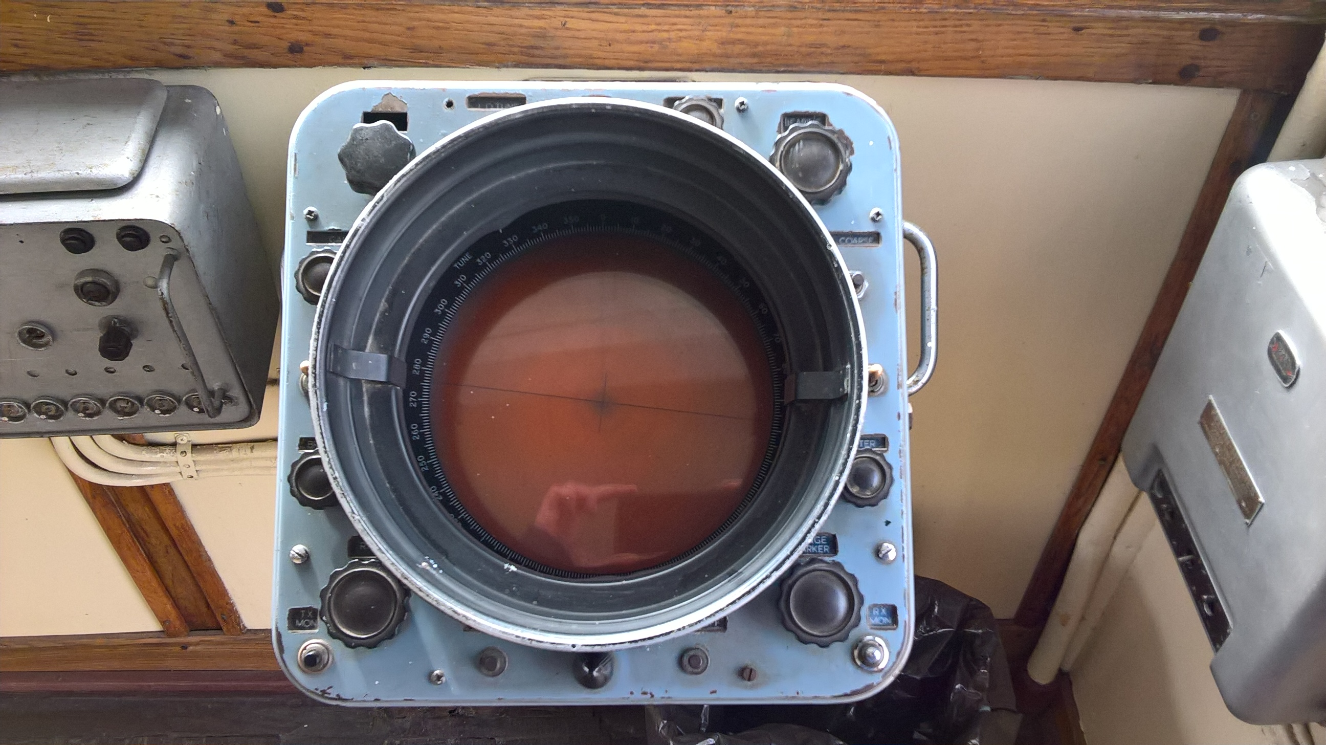 Radar Kelvin Hughes Type 14/9 na pokładzie statku-muzeum SS "Sołdek" w Gdańsku.